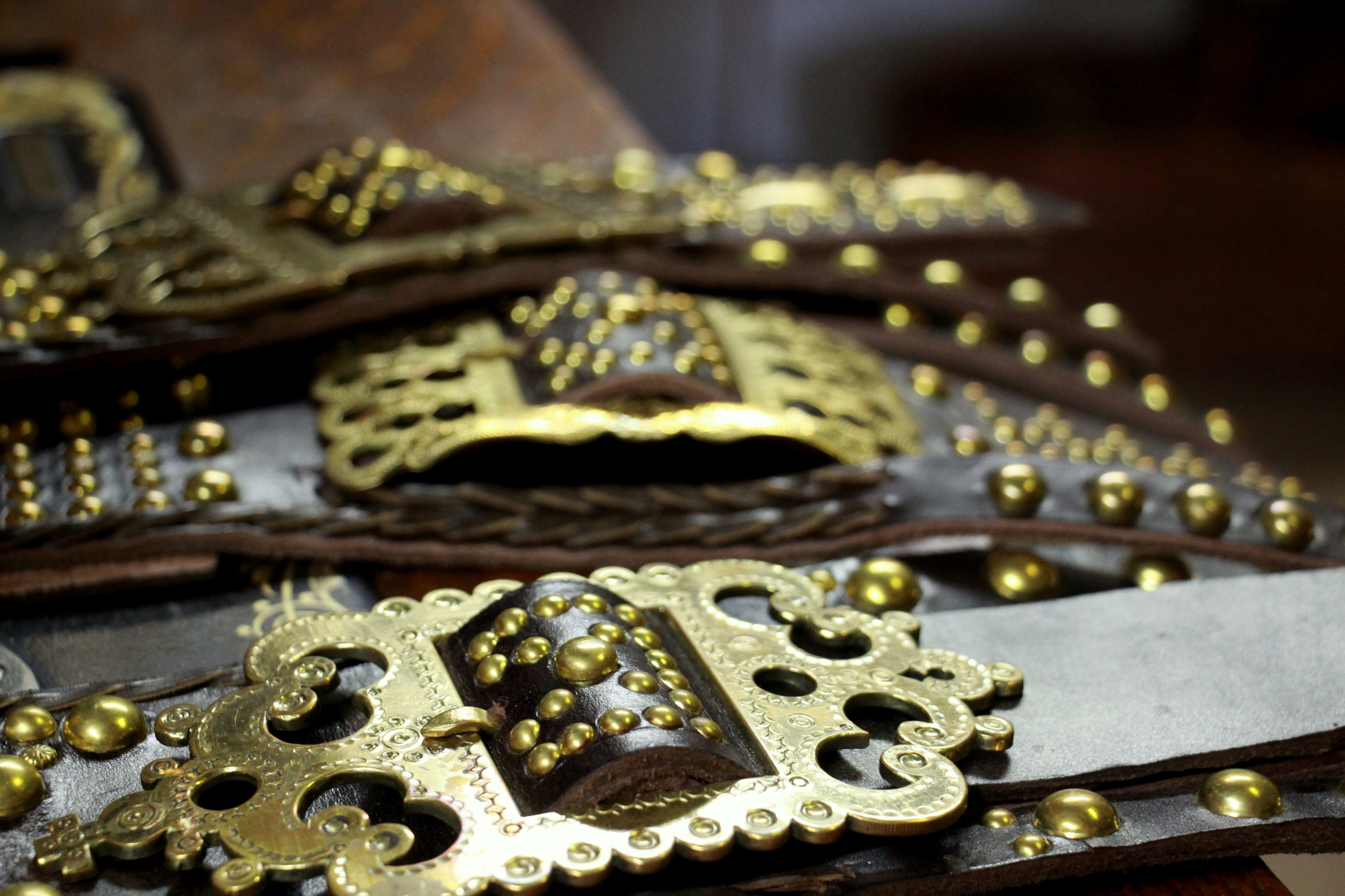 Sprzączki i pasy wykonane przez Ľubomíra Páričkę. Martin, Słowacja